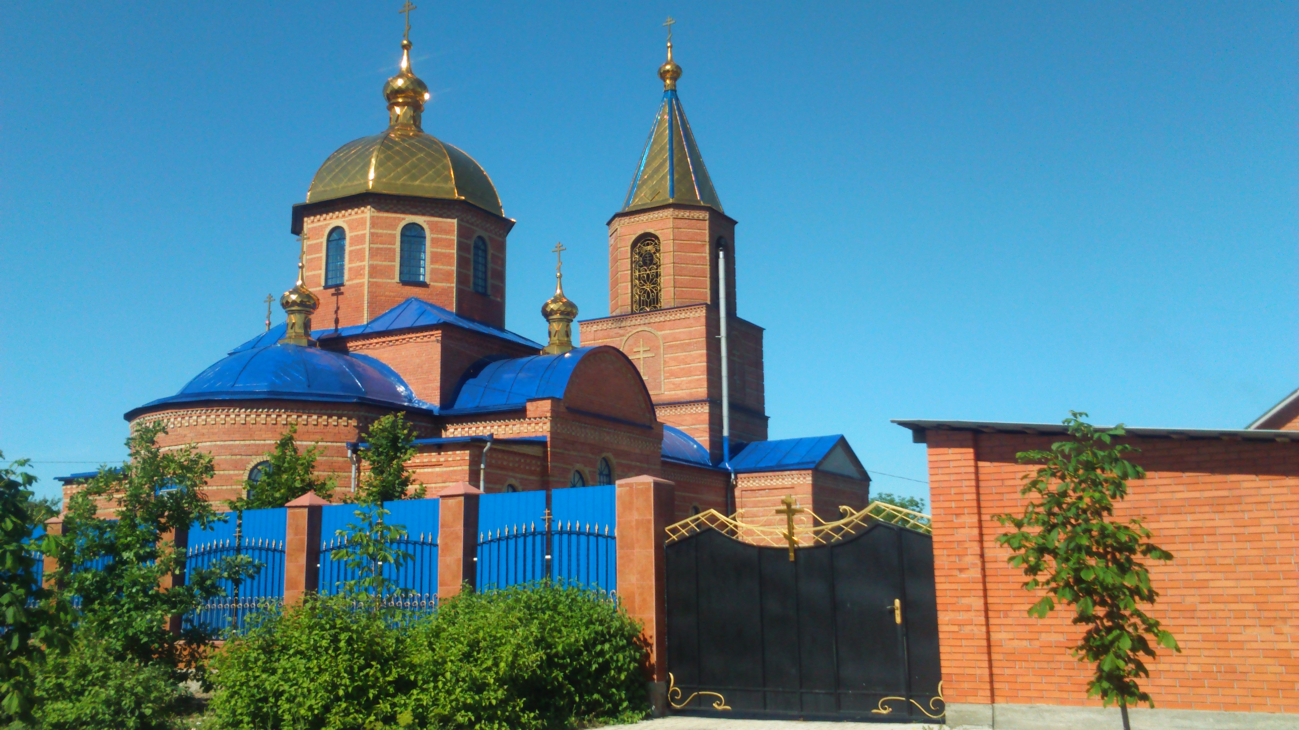 Водя́нське — селище міського типу Донецької області, підпорядковане Білицькому, розташоване на річці Водяна за 93 км від Донецька. Відстань до райцентру становить близько 6 км і проходить автошляхом місцевого значення.